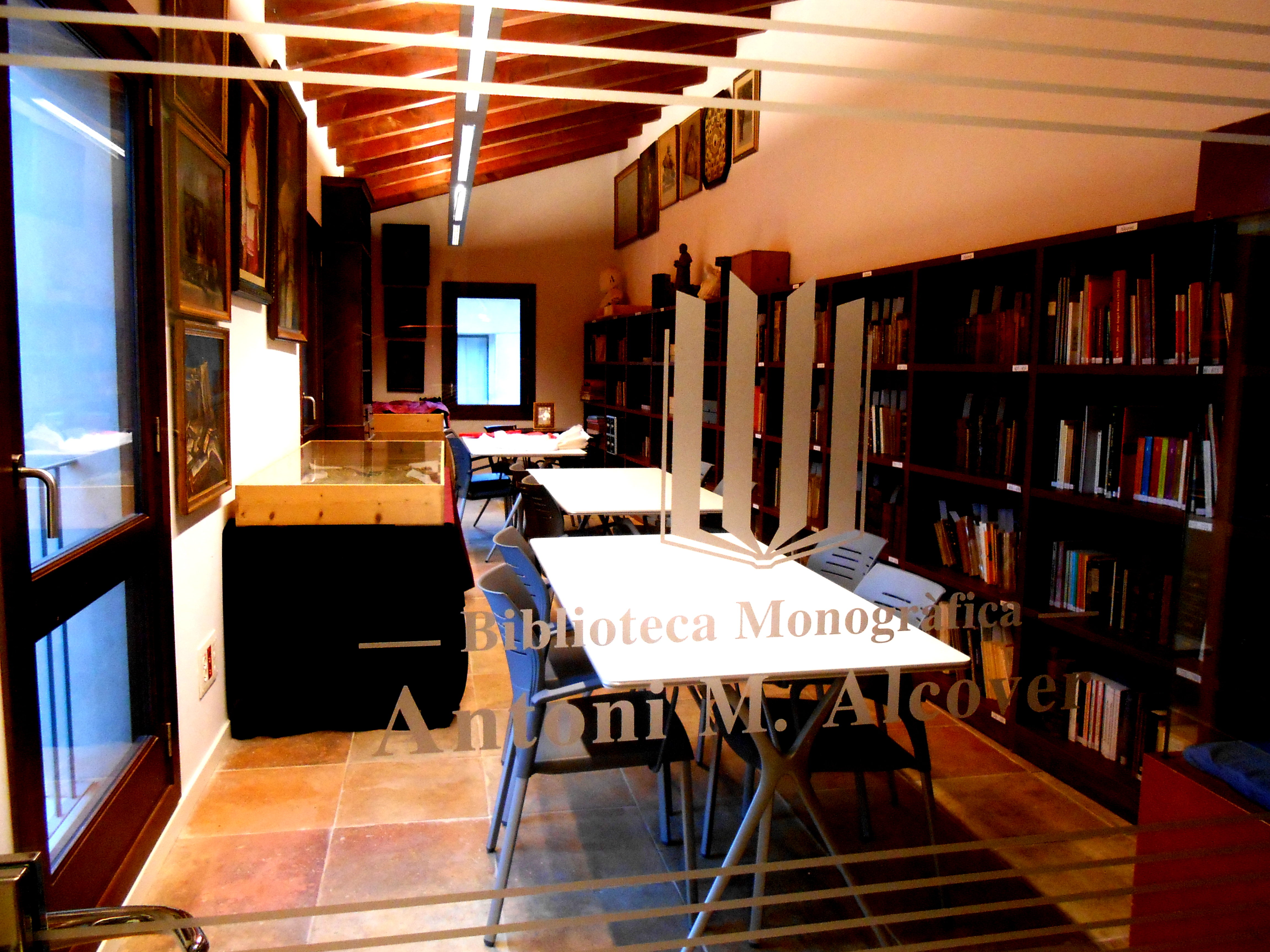 Biblioteca Monogràfica de la Institució Pública Antoni M. Alcover